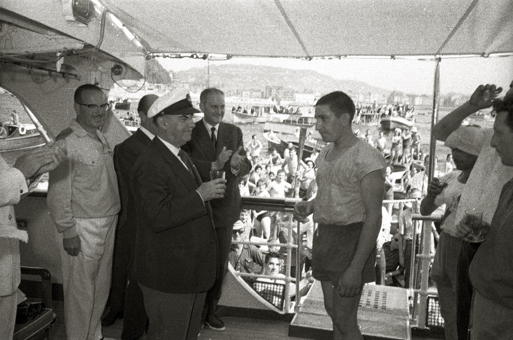 Título original: Francisco Franco durante una competición de regatas en la bahía de la Concha (6/8) Localización: San Sebastián (Guipúzcoa)